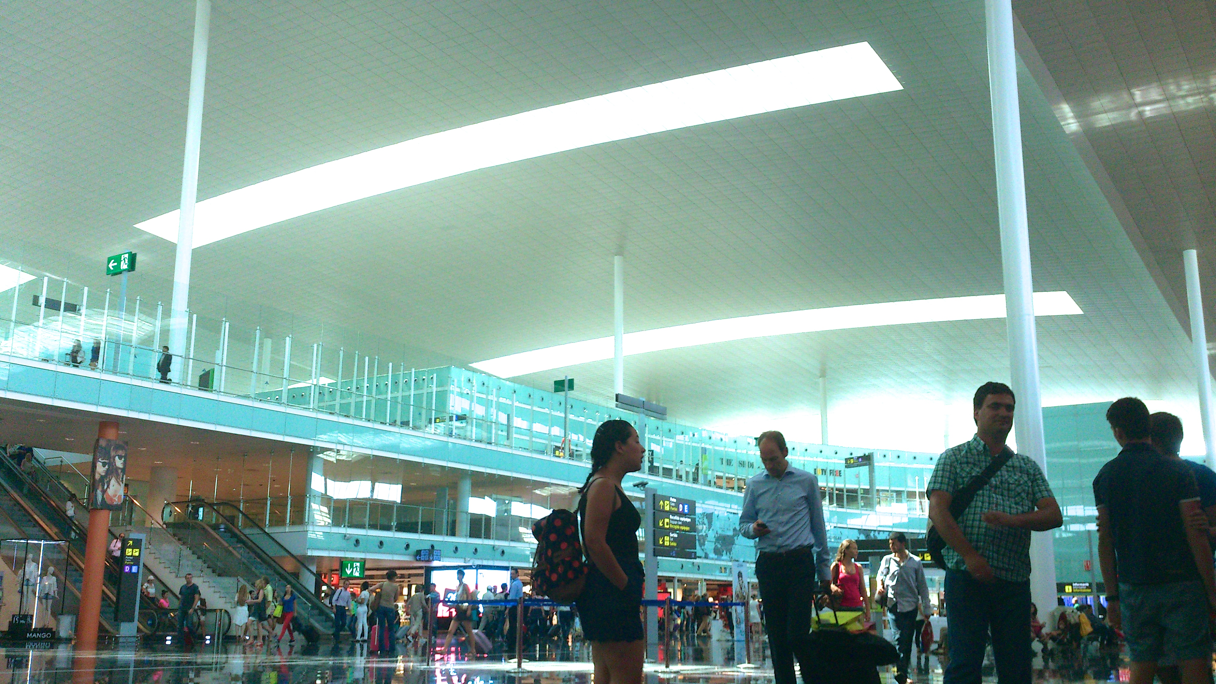 Galería comercial (SKY CENTER) de la T1 del Aeropuerto de Barcelona